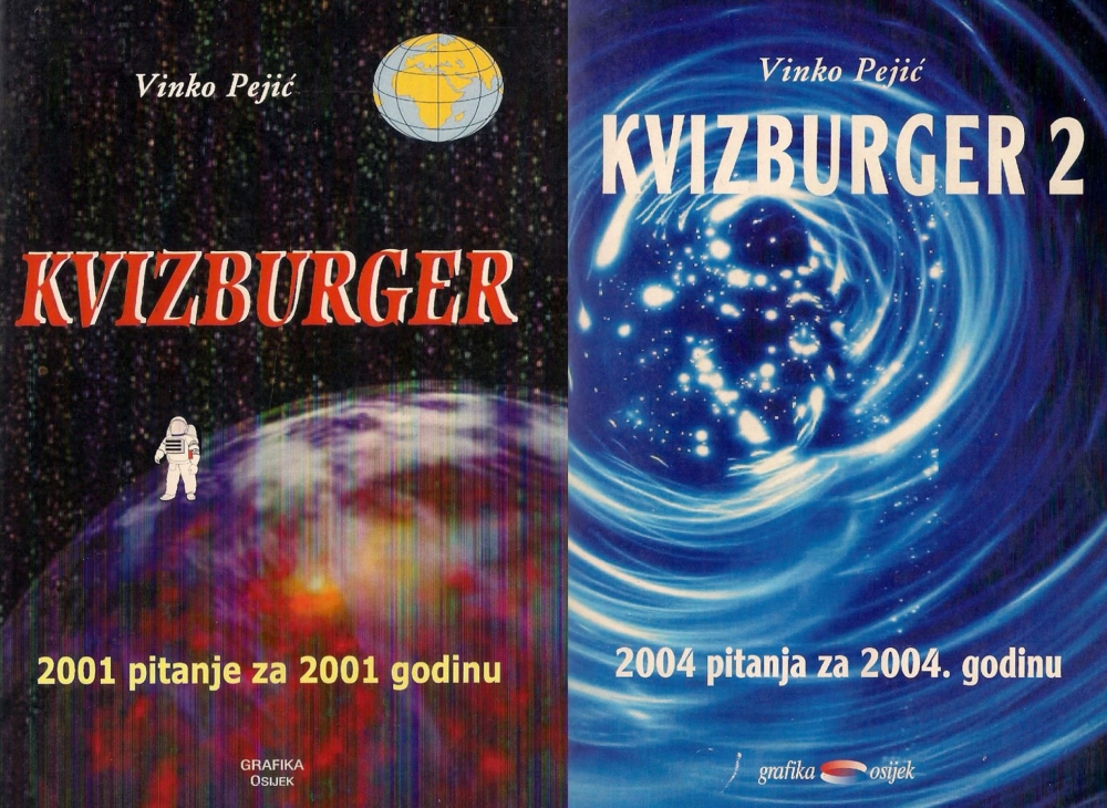 Naslovnice dvije Pejićeve knjige, prvog i drugog Kvizburgera.